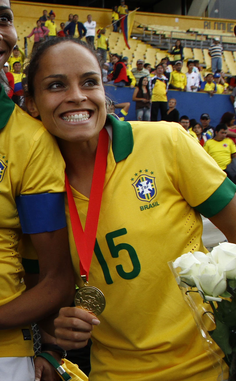 Quito, 28 sep (Andes).- La selección brasileña femenina de fútbol se proclamó Campeona de la Copa América de Fútbol Ecuador 2014. Foto: Micaela Ayala V./Andes